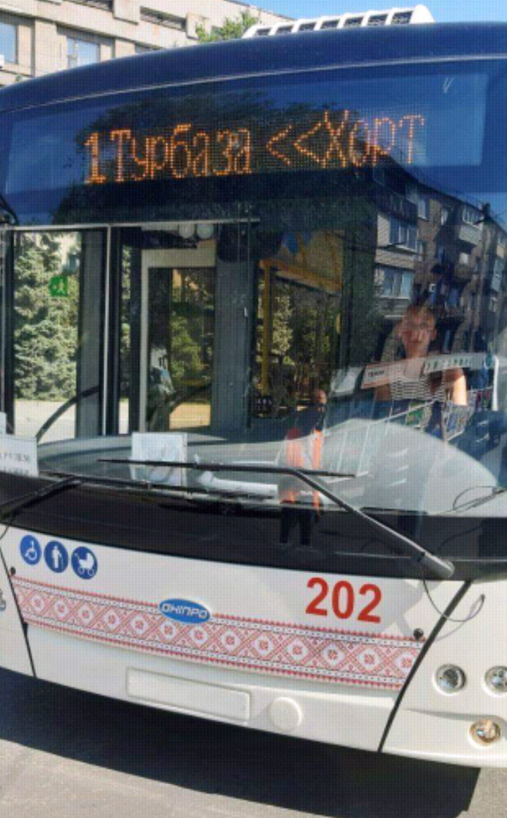 Запоріжжя, площа Профспілок. Дніпро Т203 (№ 202) — маршрут 1